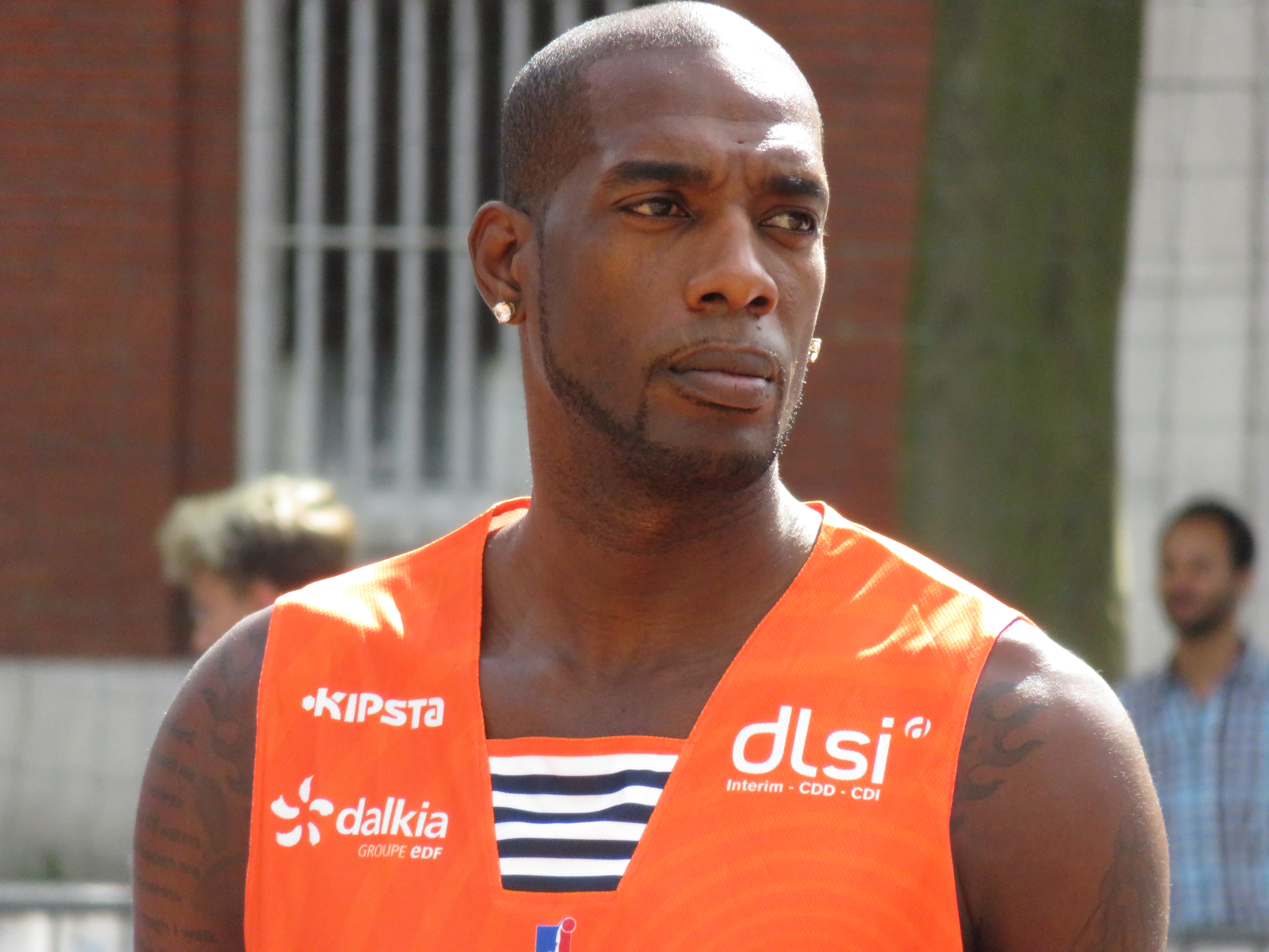 33 Shawn King